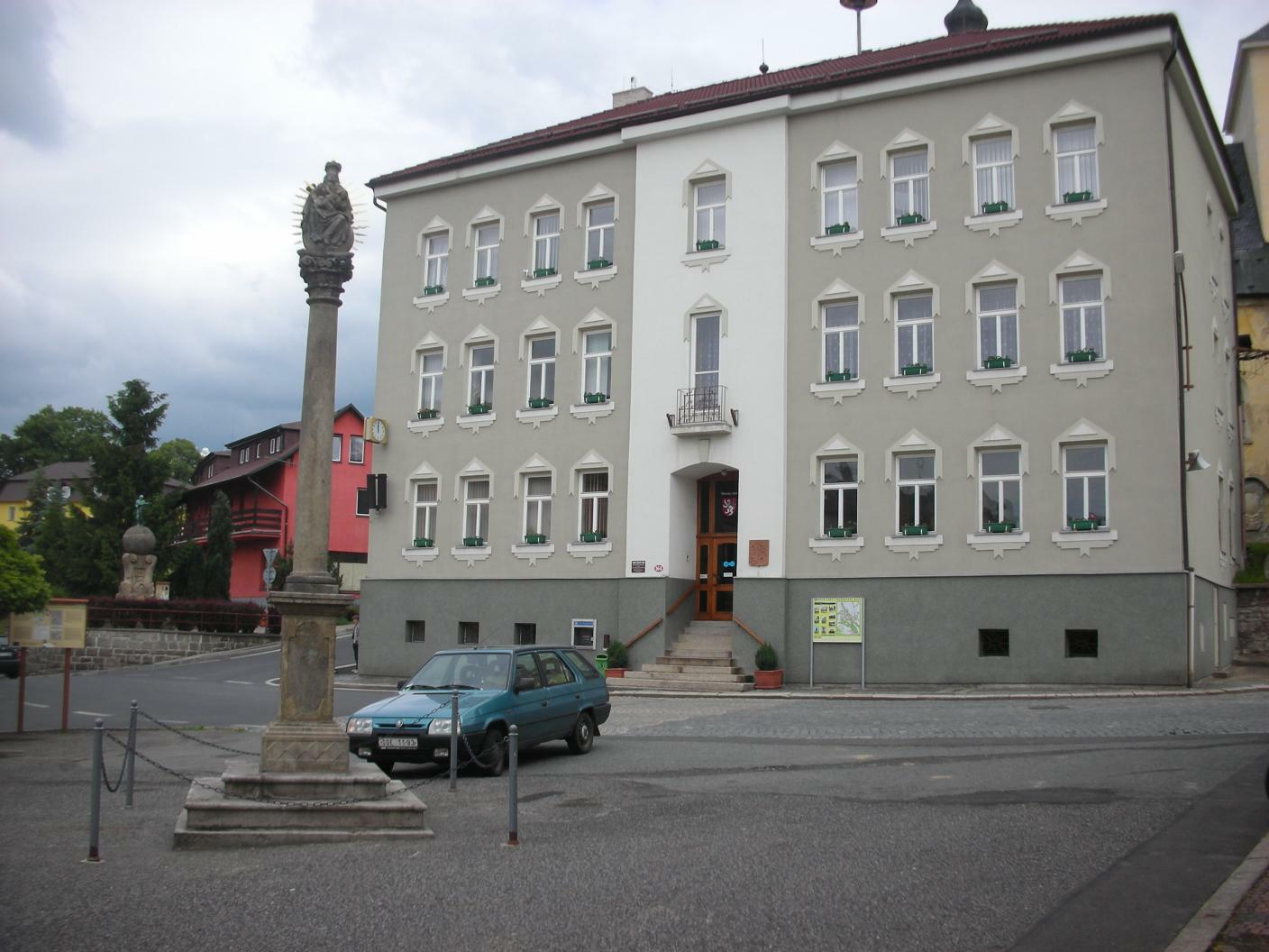 Rathaus in Luby, Tschechien